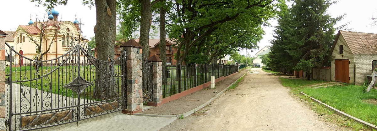 Bukiškių kaimas